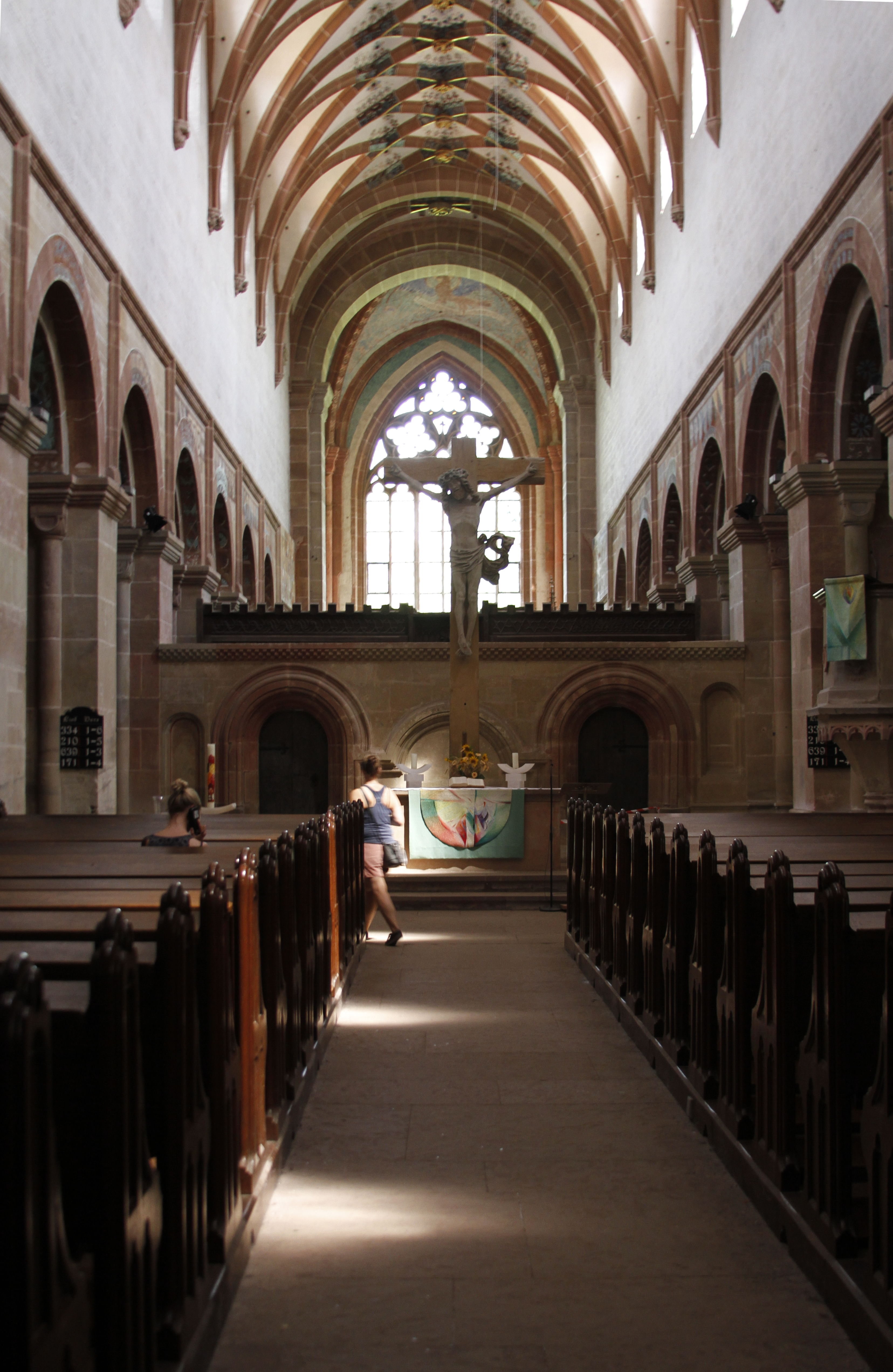 Laymen's church - Maulbronn Monastery - Maulbronn - Germany